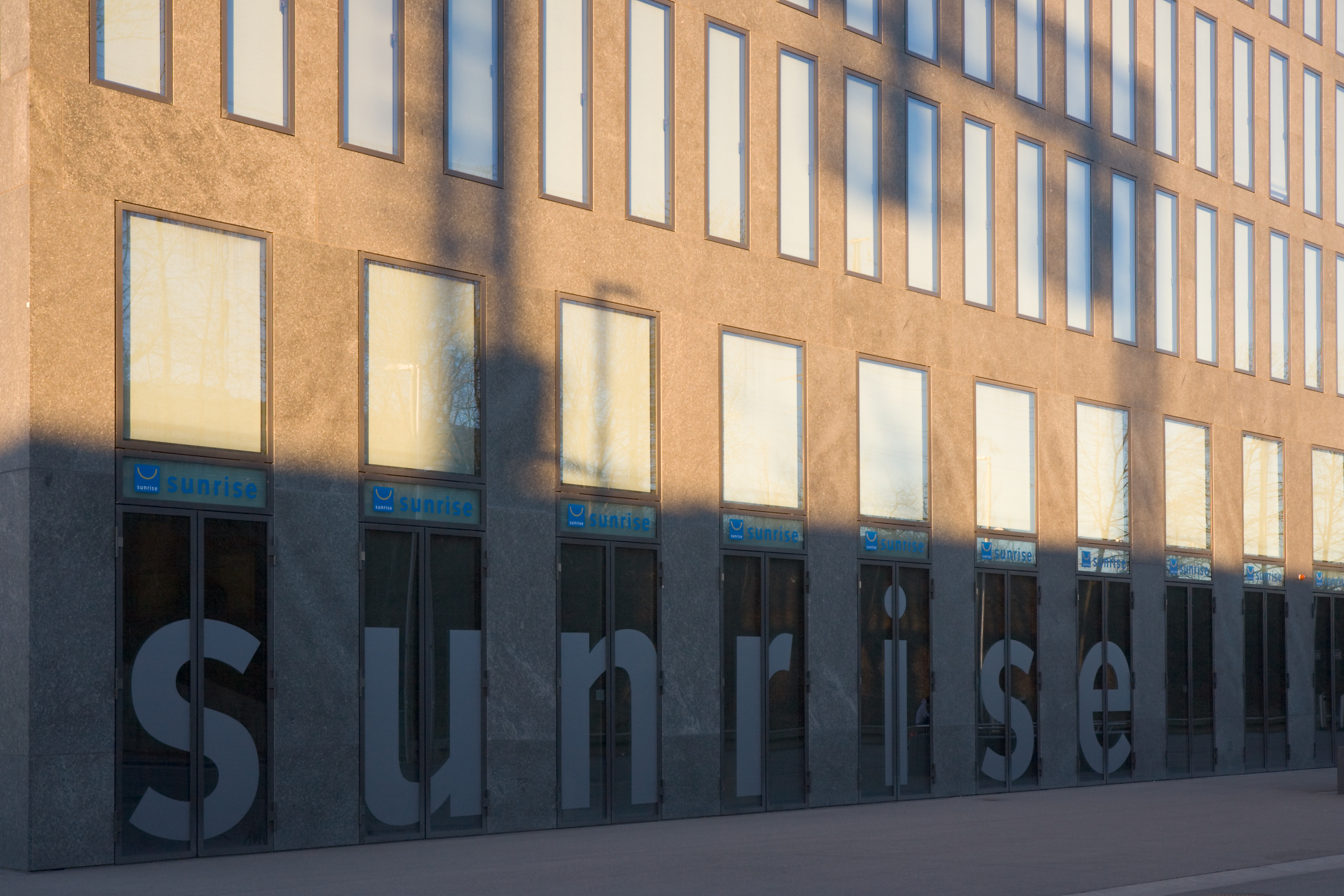 Das Sunrisehochhaus in Zürich Nord, Schweiz